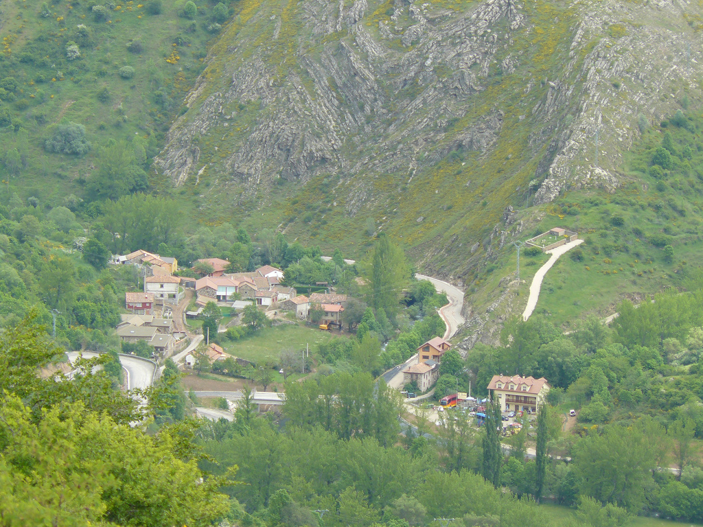 Desde la atalaya (Valporquero)